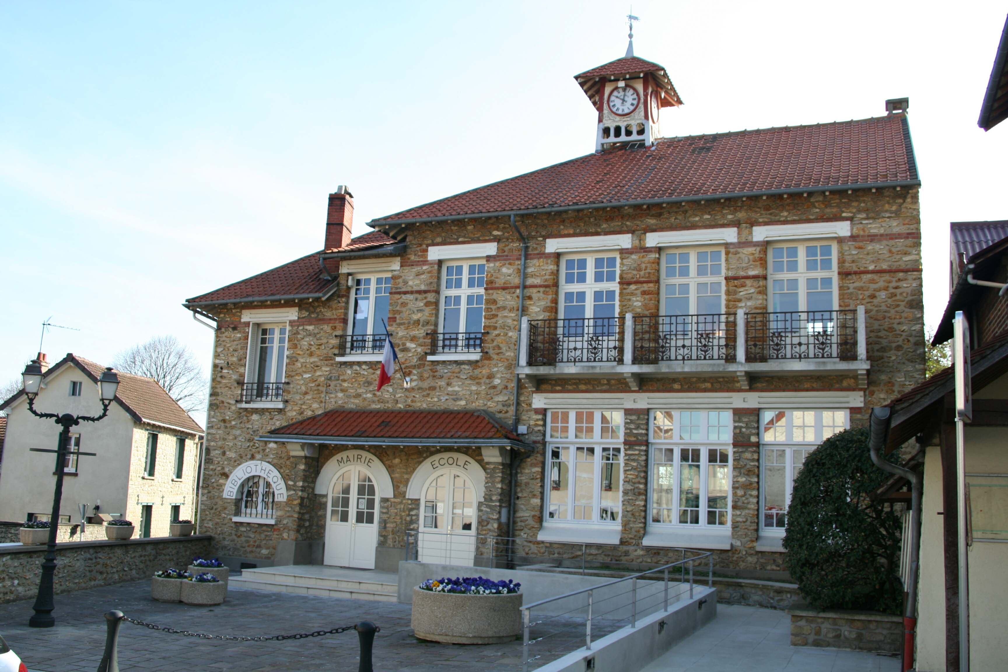 Mairie de Chapet - Yvelines (France)